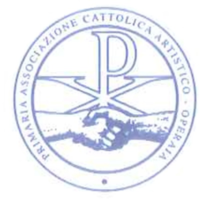 Primaria Associazione Cattolica Artistico - Operaia